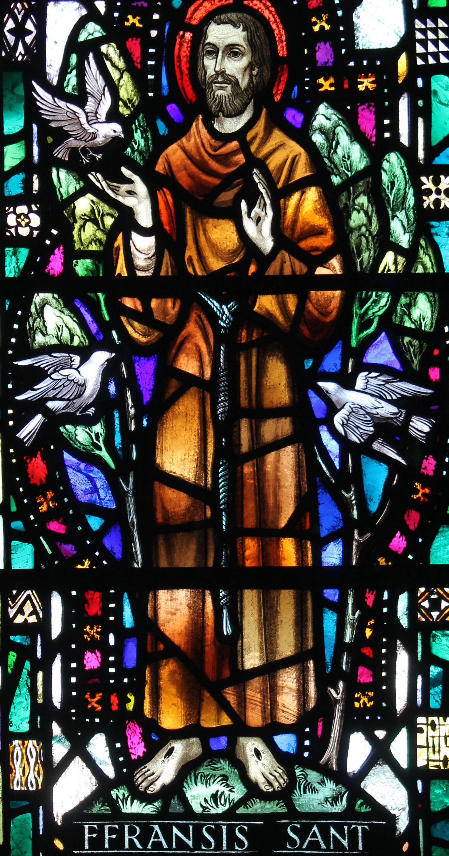 Eglwys y Santes Fair, Ystrad Fflur - drws nesa i'r abaty.